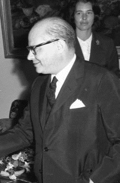 Bundesmin. Dr. [Heinrich] Krone empfängt den Vorsitzenden der Liberalen Partei Kolumbiens Dr. Carlos Lleras Restrepo (rechts) im Haus des Bundeskanzlers